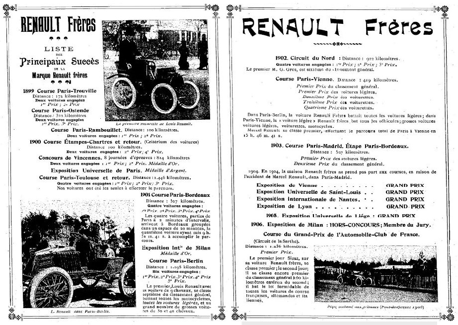 Succès Renault de 1899 à 1906 - Histoire de l'automobile, Pierre Souvestre, éd. H. Dunod et E. Pinat, 1907 (ASIN B001BPBE58) p.772-773